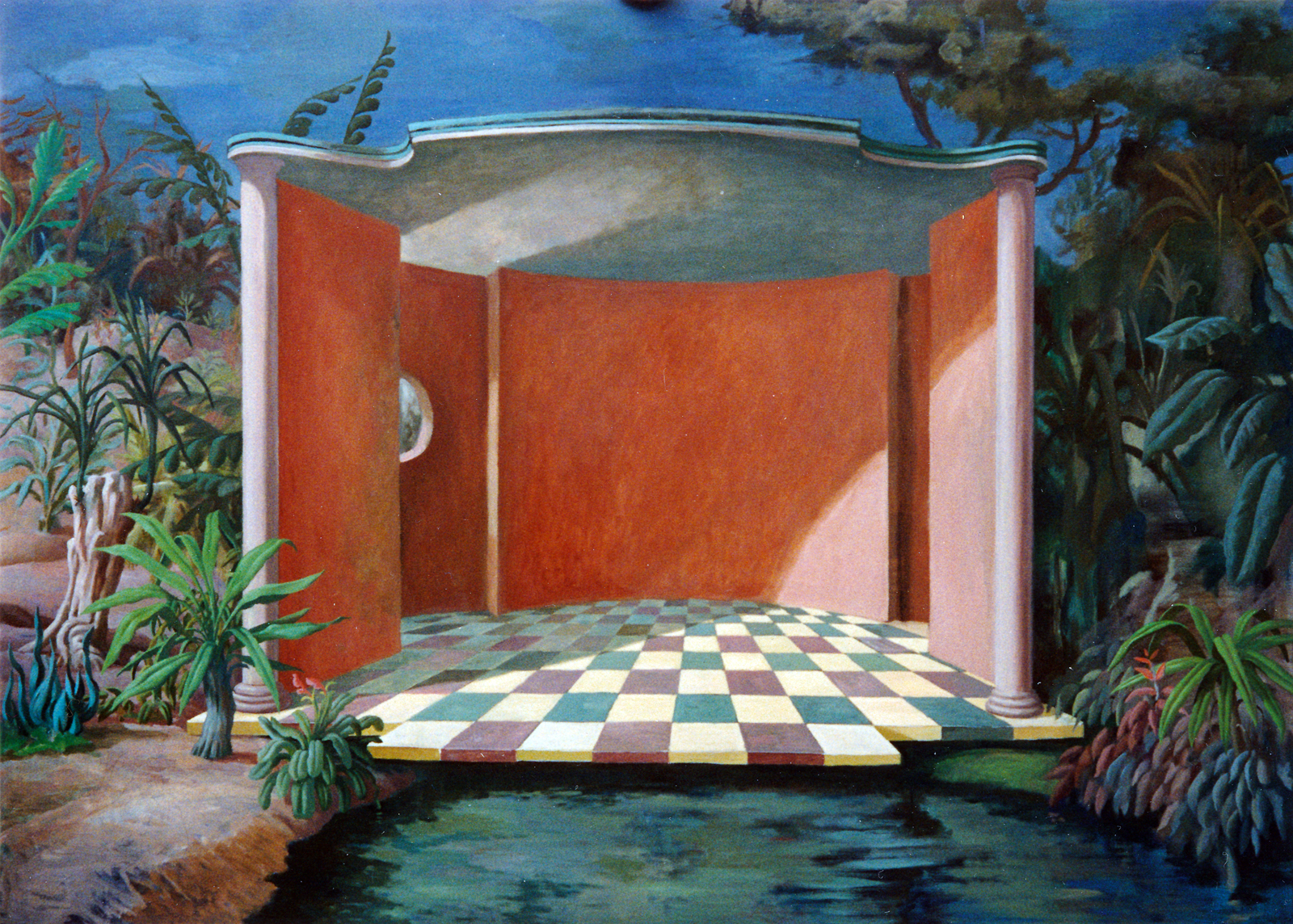 Milan Ressel, Zahradní pavilon (1994-1995)